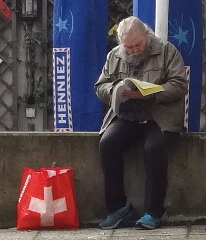 Personne consultant l'annuaire téléphonique dans la rue, quartier des Acacias à Genève.